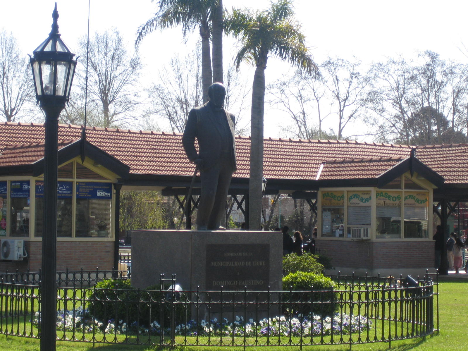 Estación fluvial de pasajeros Domingo Faustino Sarmiento - Buenos Aires - Argentina